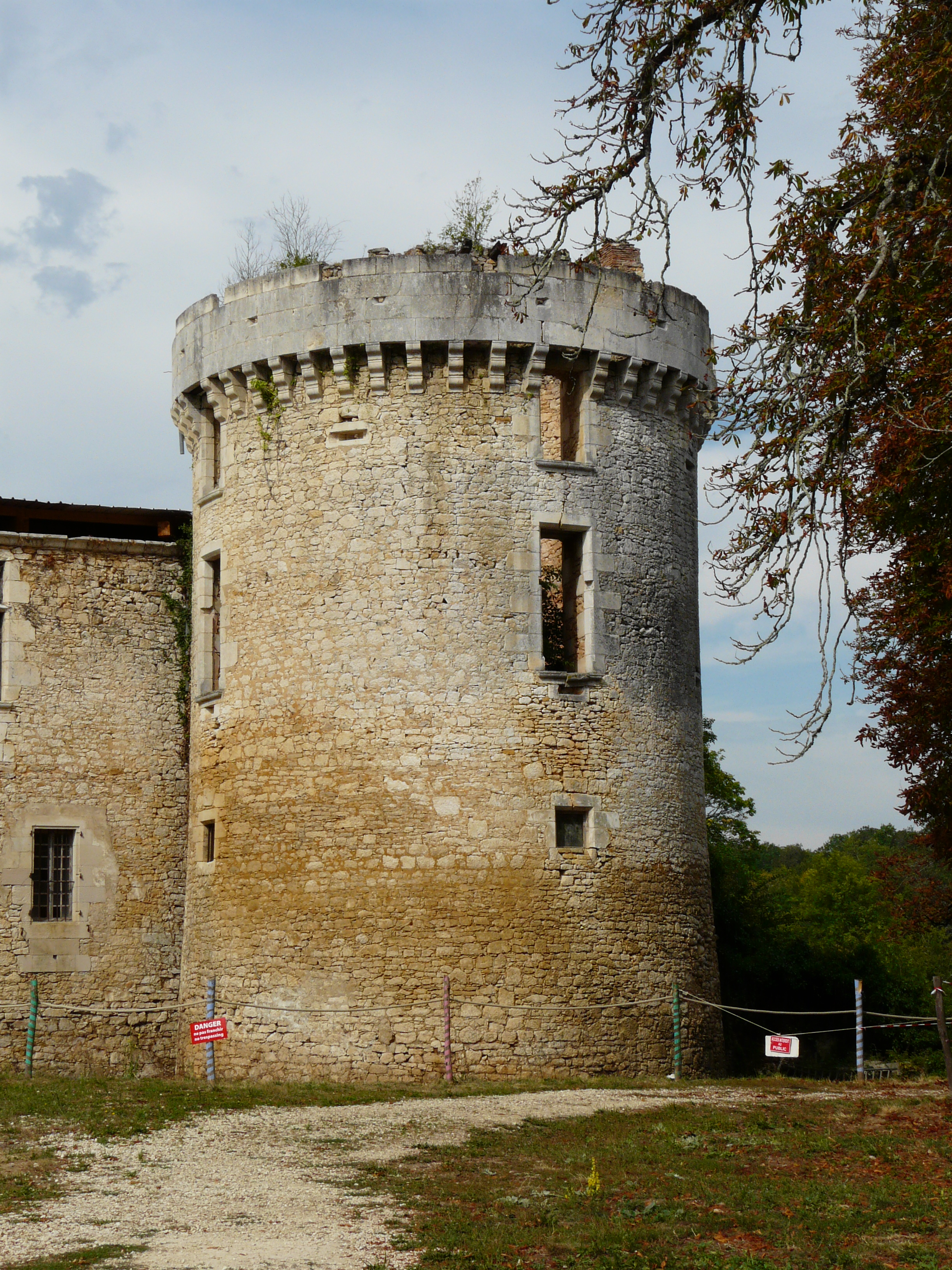 La tour nord du château de Laxion, Corgnac-sur-l'Isle, Dordogne, France.